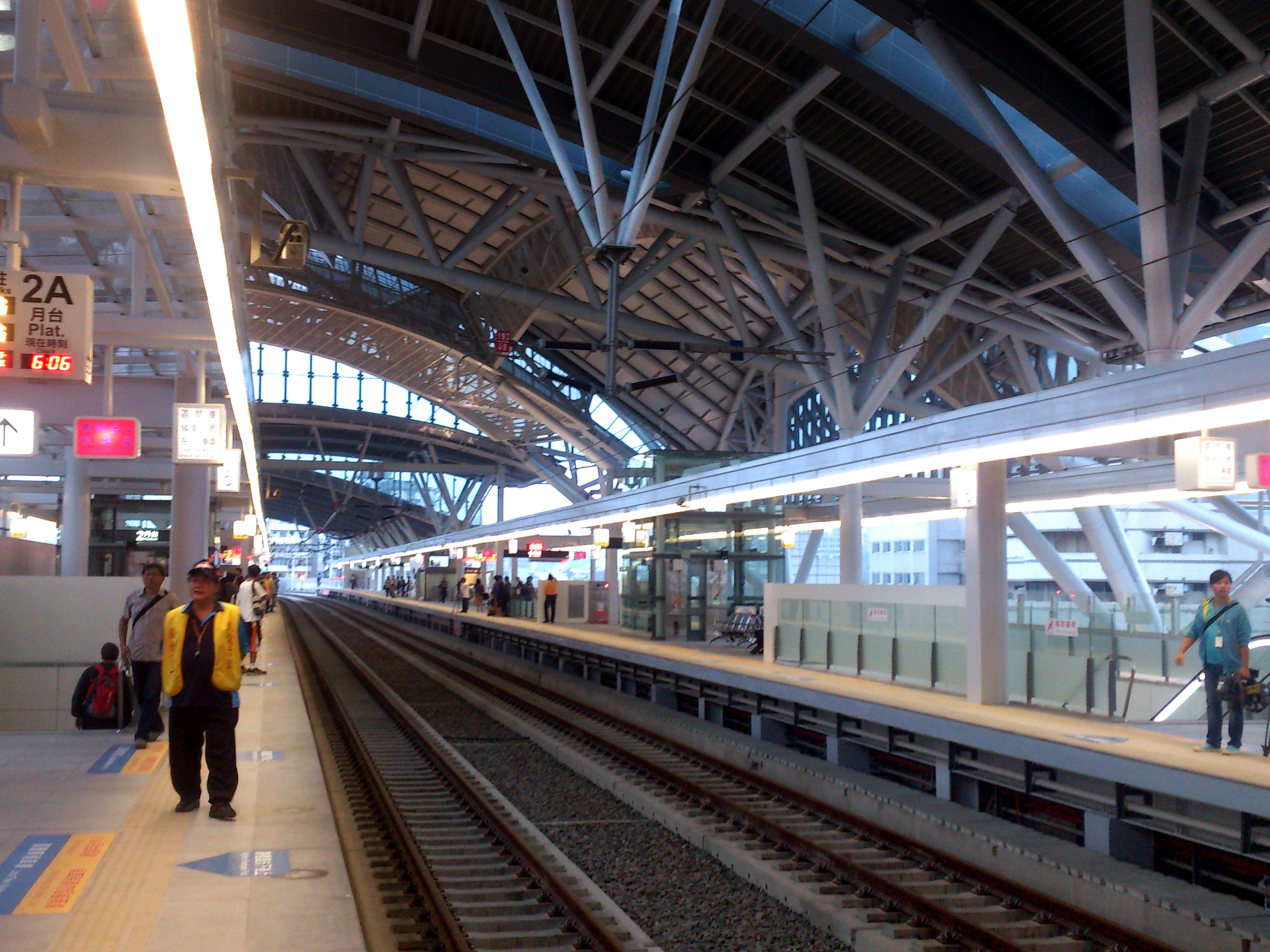 臺中車站三樓月台層